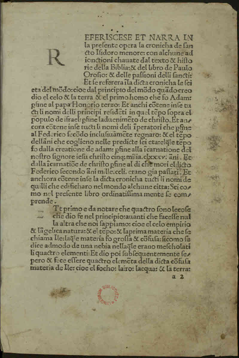 Chronica minor (italiano). - Stampata in Aquila : per maestro Adam de Rothvvil alamano, alli anni domini MCCCCLXXXII Addi cinque di octobro. - 50 c. ; a-e⁸, f¹⁰ ; 4°. - Mancano le cc. a1 e f10 .